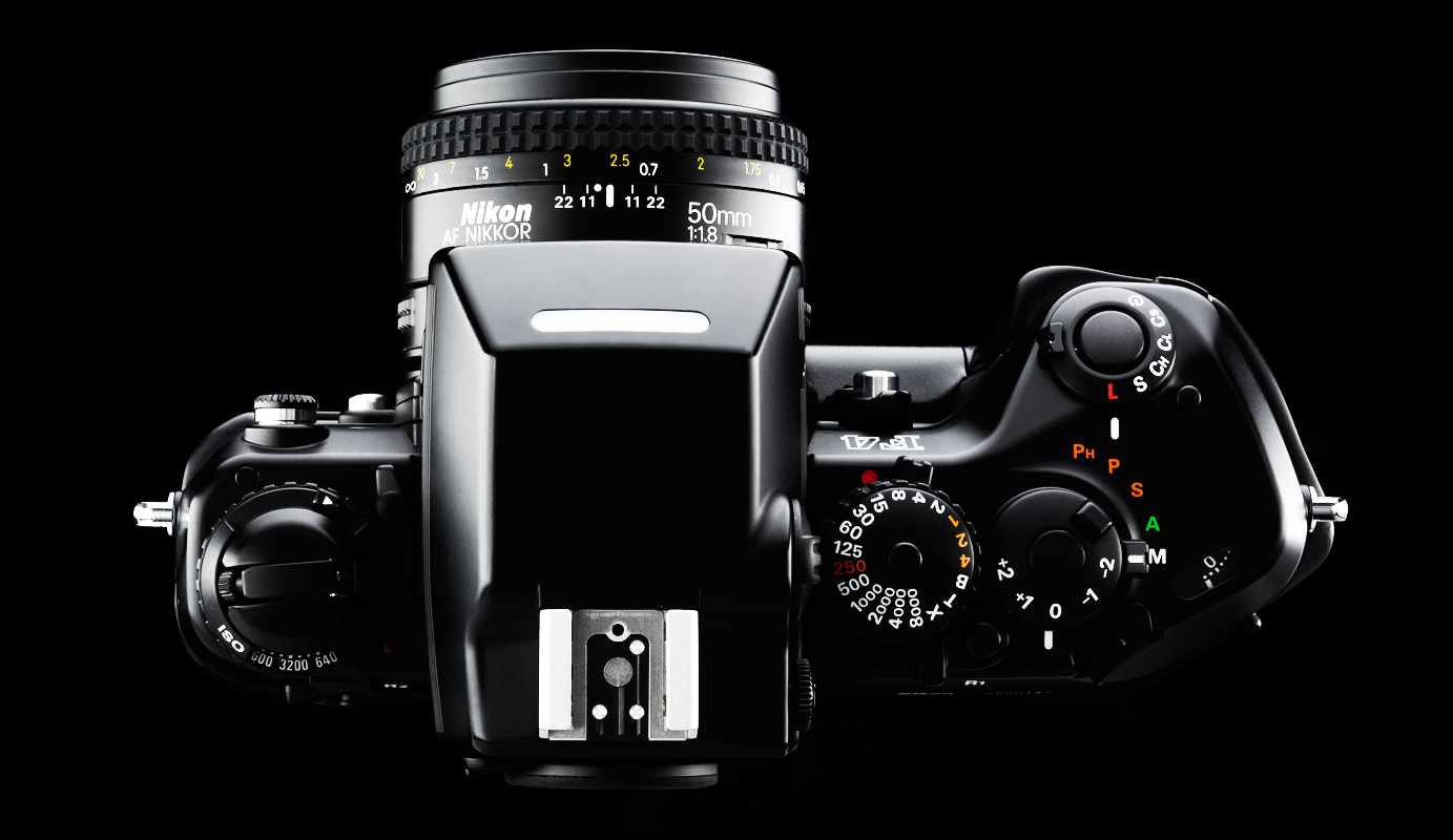 Nikon F4 F4s Camera